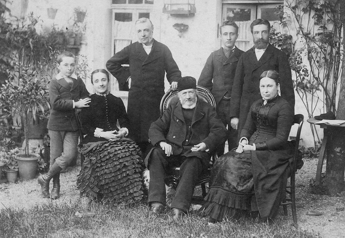 Jean Antoine, Camille et Edouard Rabaud pasteurs